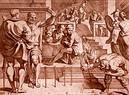 Odysseus Schuß durch 12 Axtösen